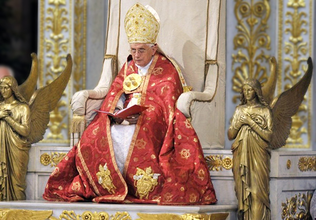 Papa Benedetto XVI presiede la cerimonia d'apertura dell'anno paolino - 29 giugno 2008